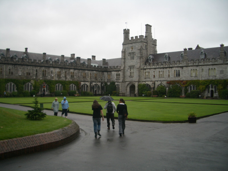 University College Cork, West Wing